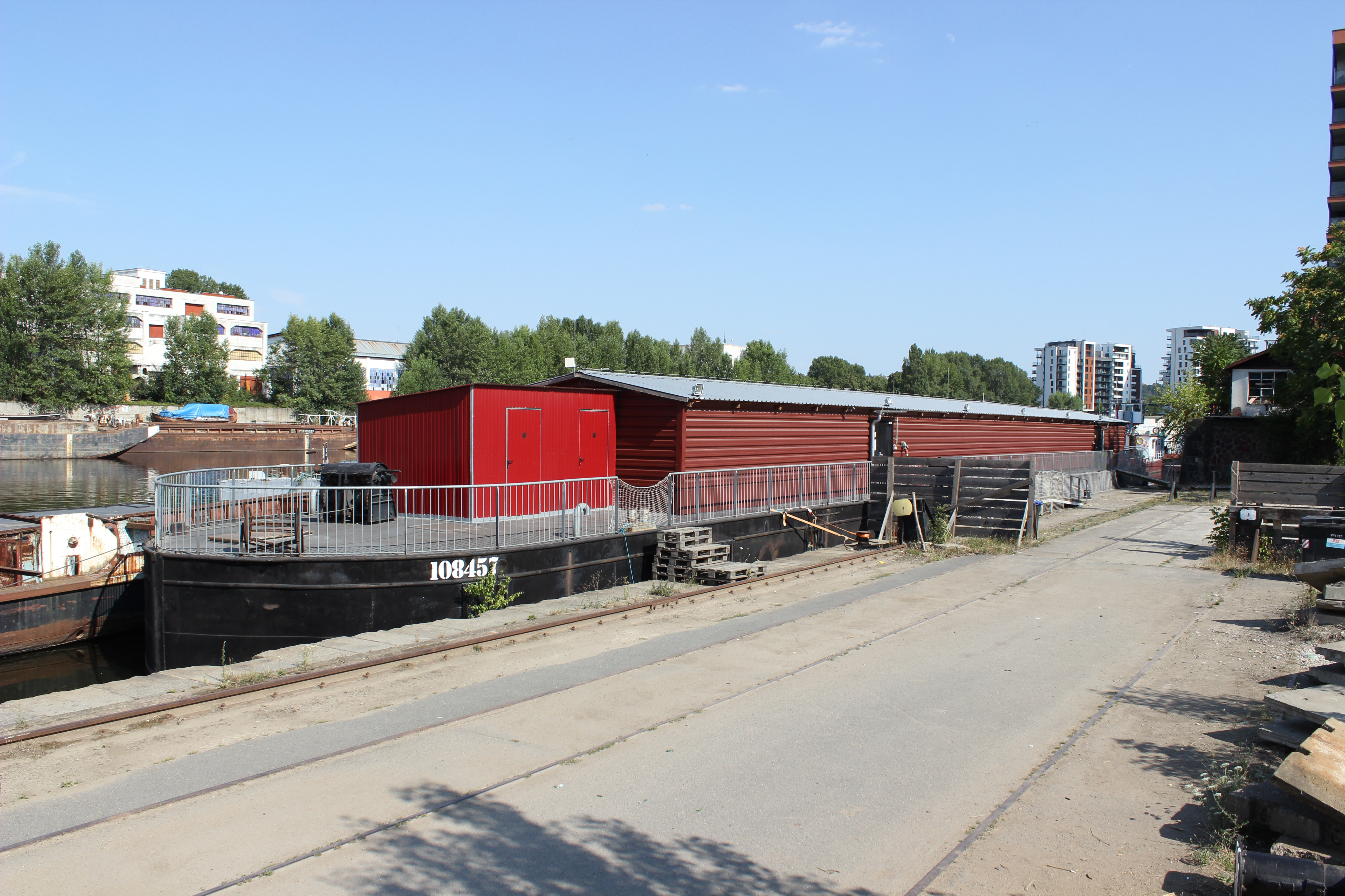 Pražský kostel na lodi při pohledu od severozápadu.